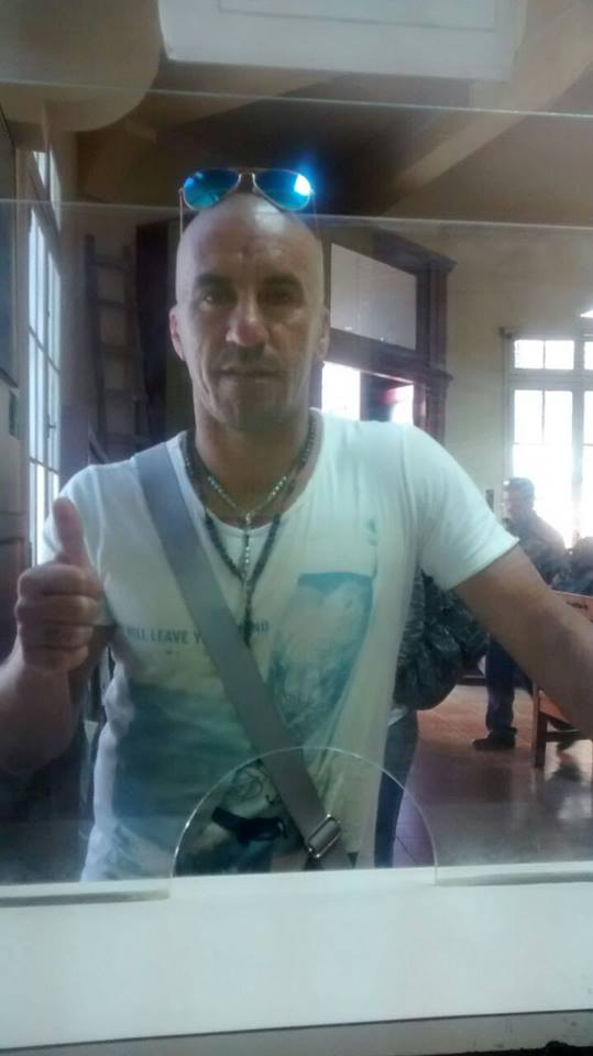 El jugador de Magallanes